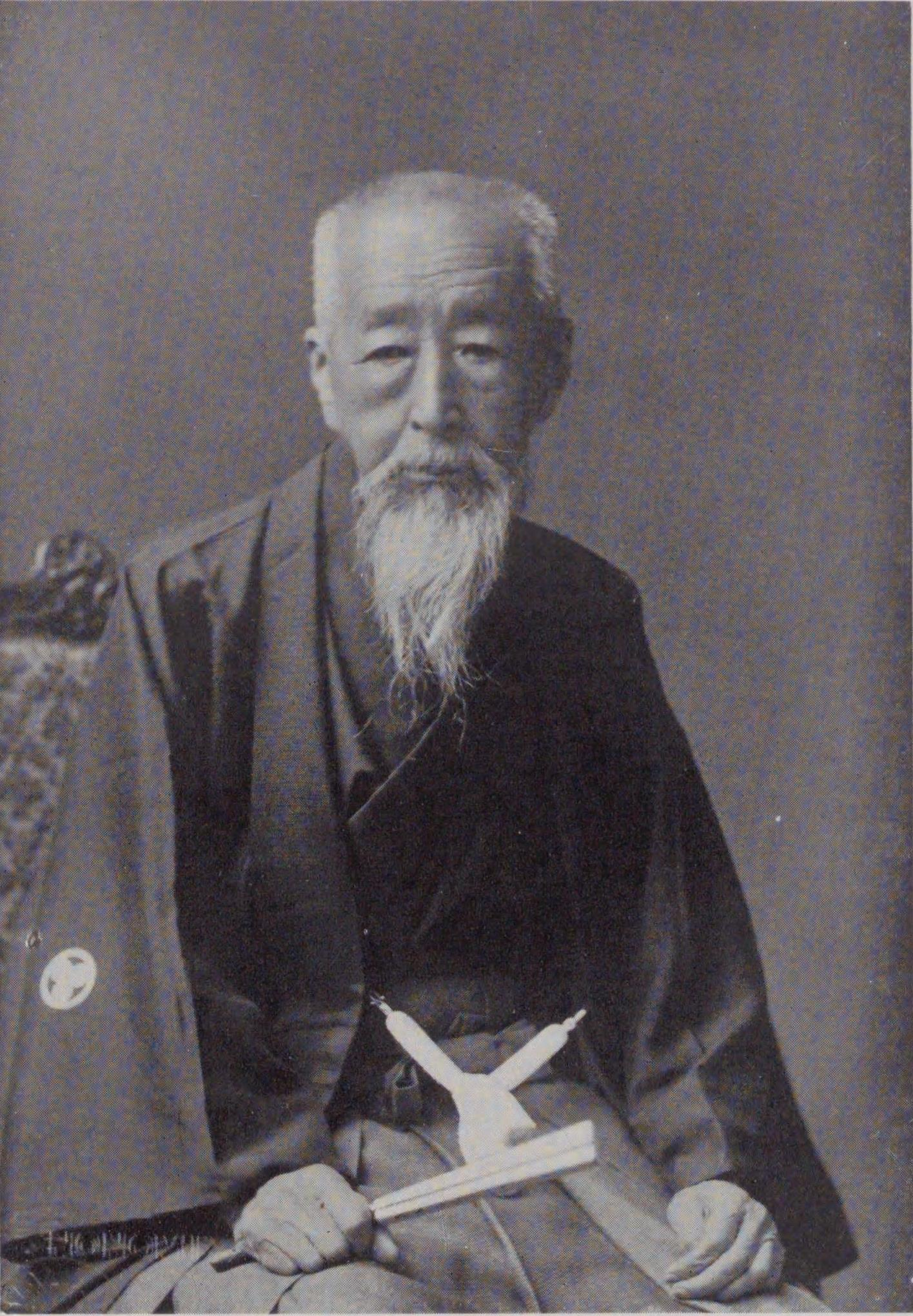 88歳の小鷹狩元凱